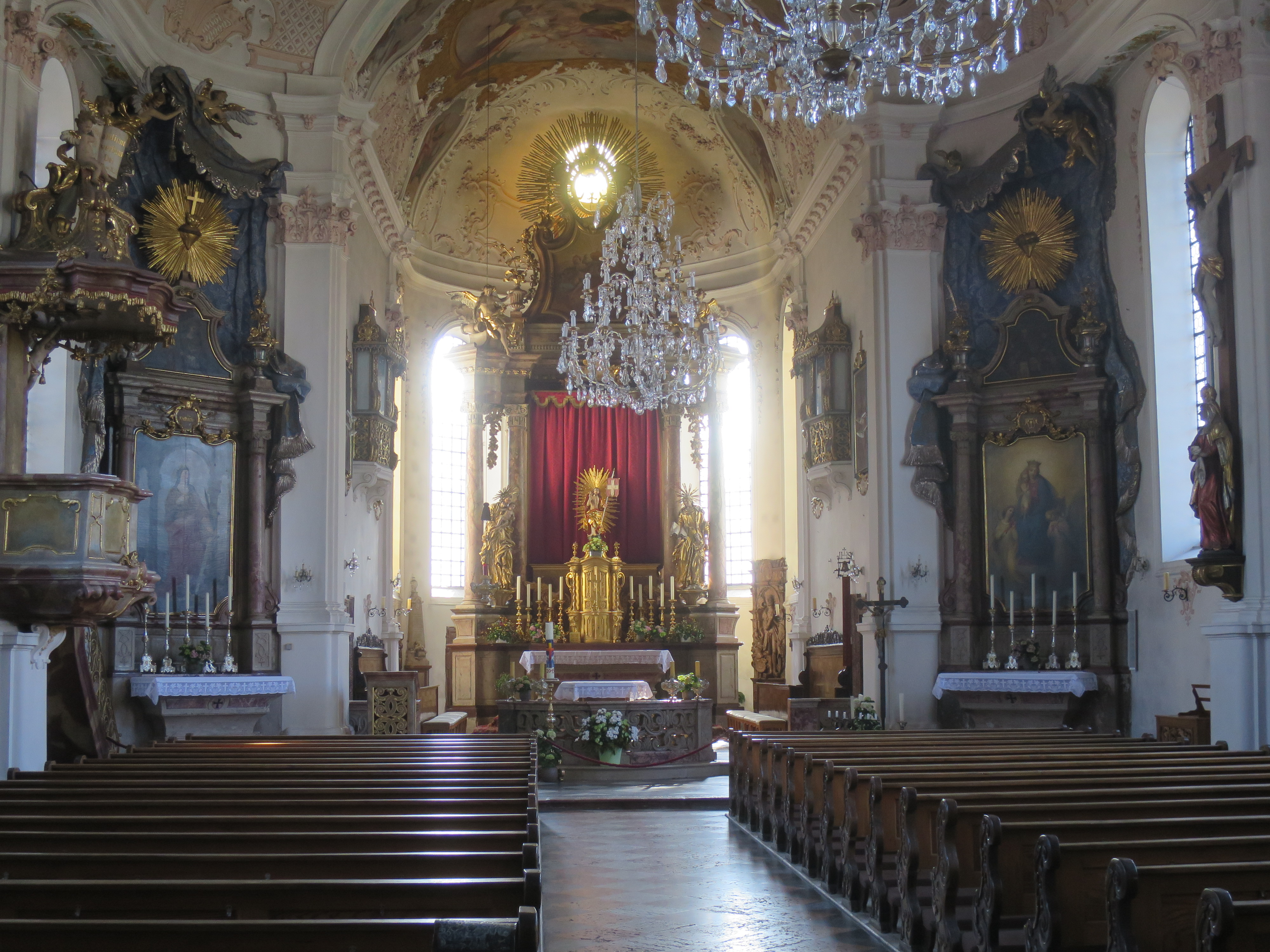 Innenansicht der Pfarrkirche Mariä Himmelfahrt, Prien am Chiemsee